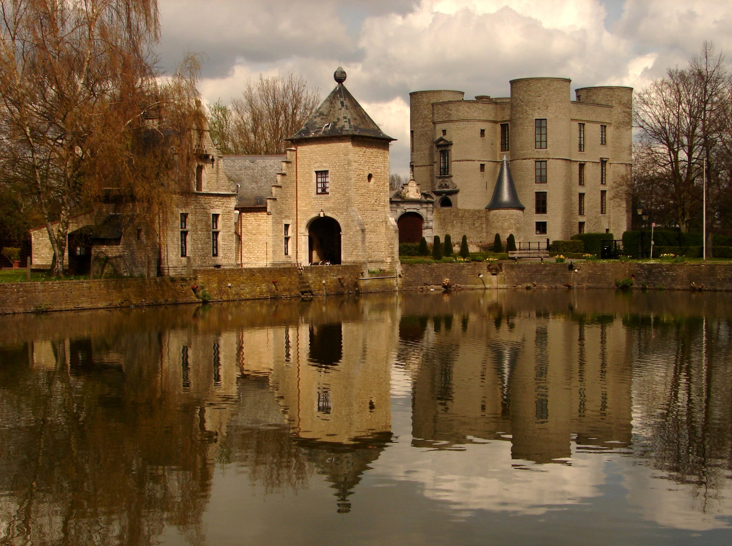 Kasteel van Ham, Steenokkerzeel